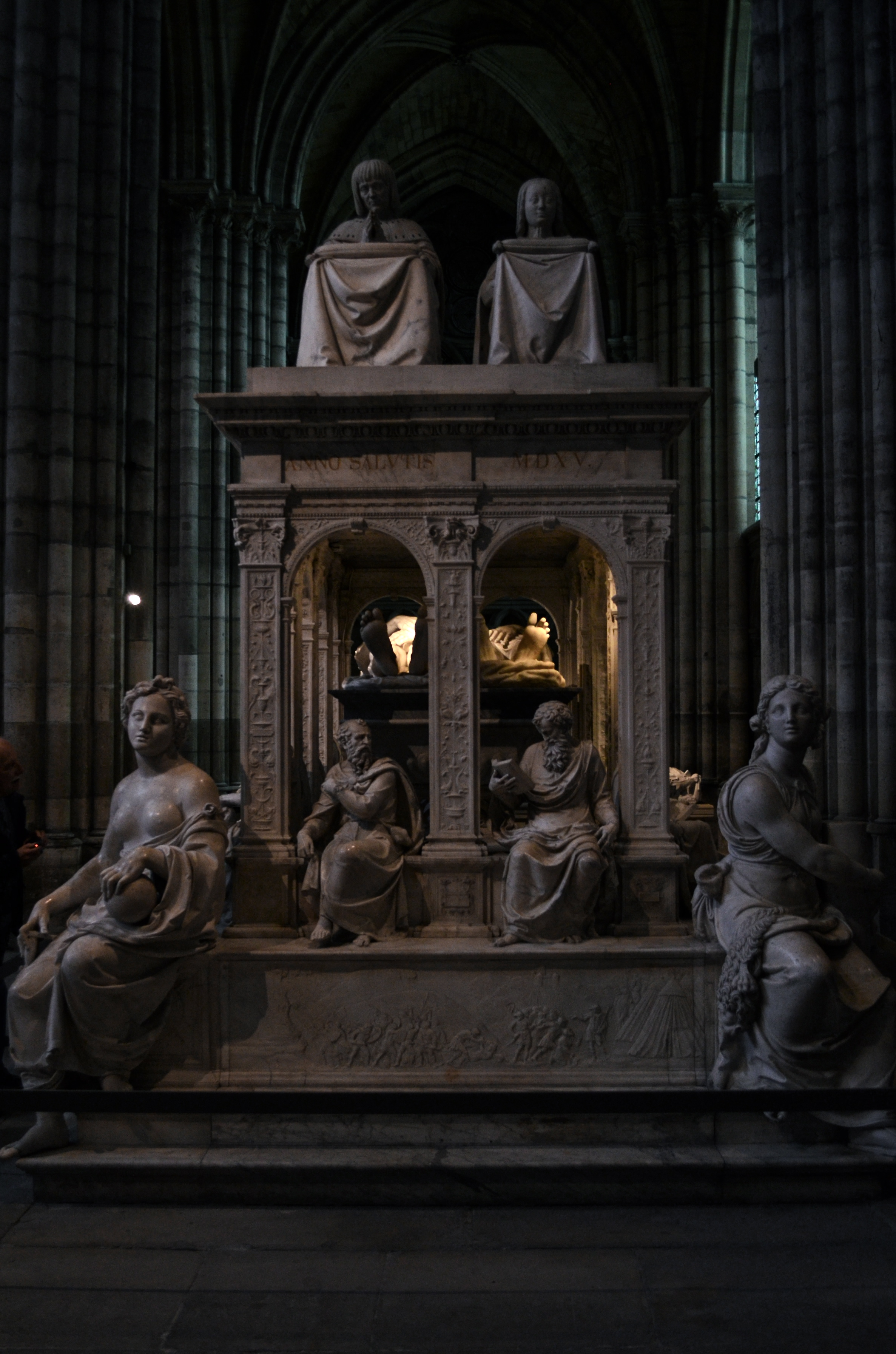 Tombeau monumental d'Anne de Bretagne et de Louis XII, en la Basilique Saint-Denis. Sculpteurs : les frères Juste (Betti). Photographe : lombregrise.